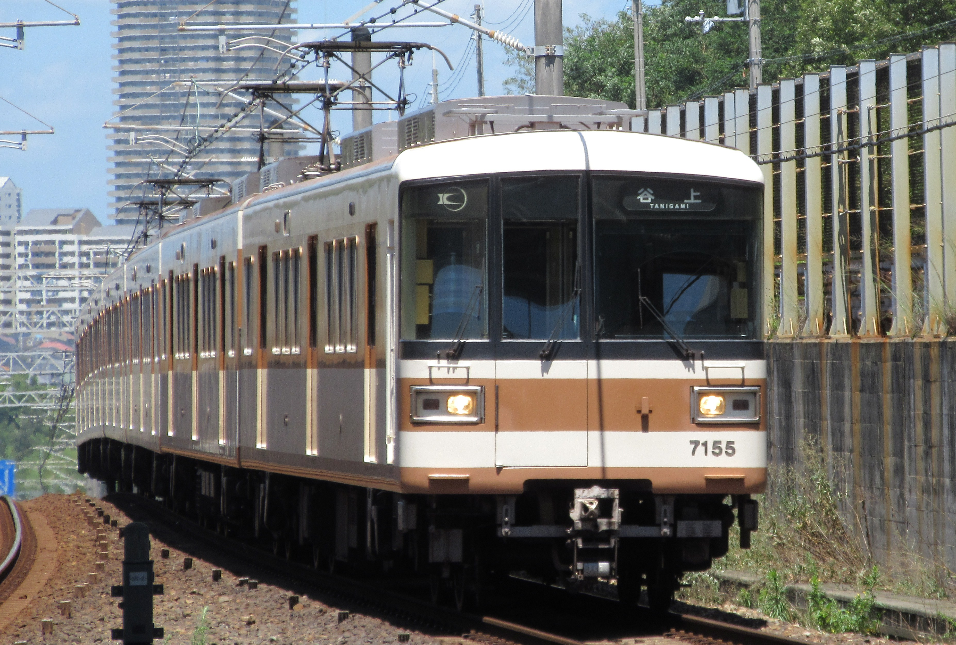 北神急行電鉄7155編成(西神南駅にて)